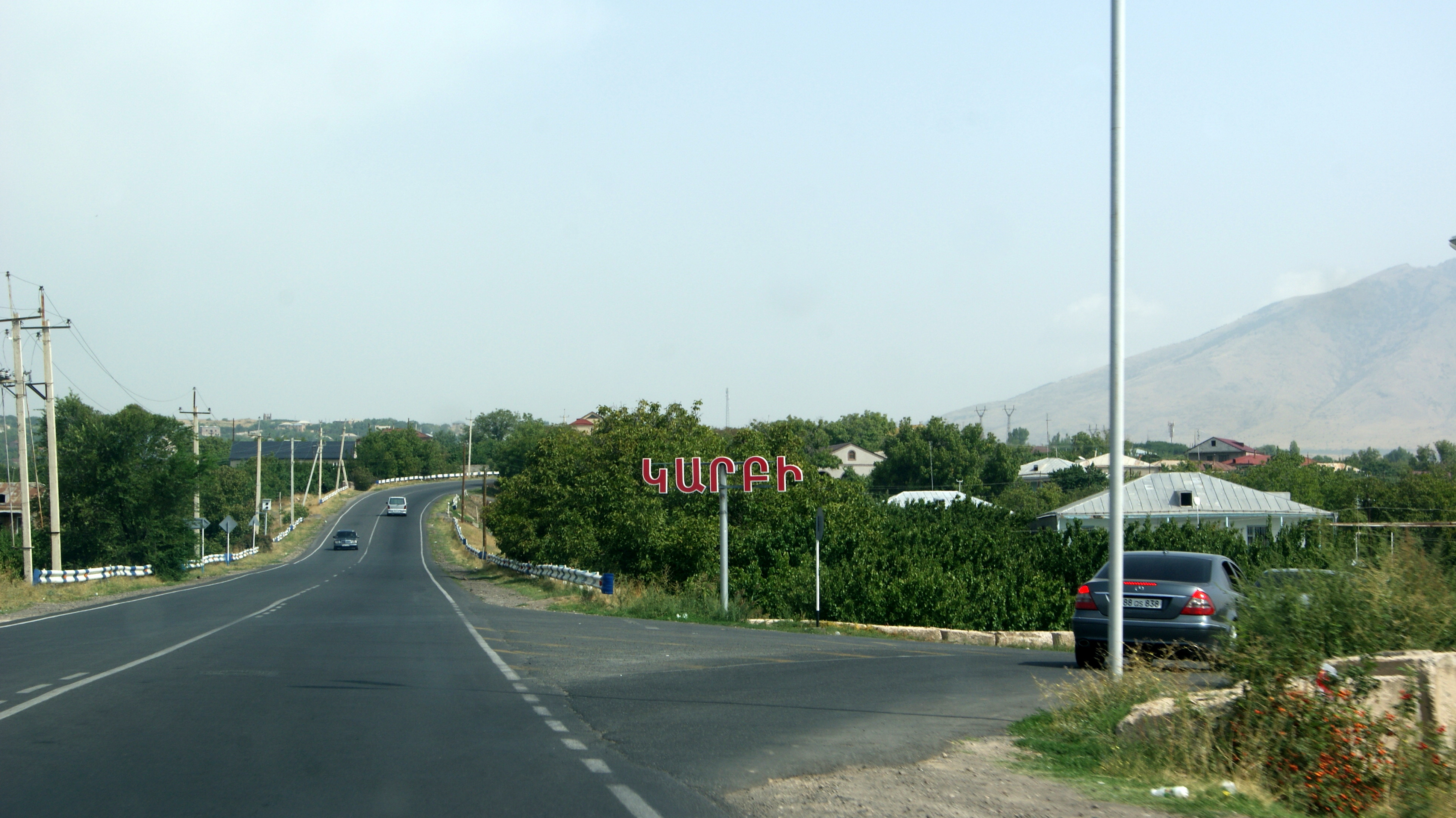 Կարբի